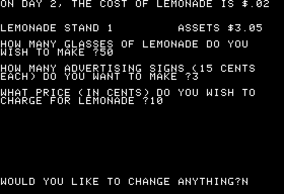 Lemonade Stand